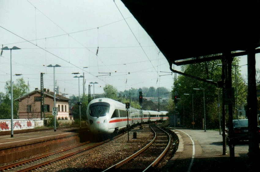 ICE Pfälzerwald Saarbrücken - Frankfurt/M. - Leipzig - Dresden durchfährt St. Ingbert.